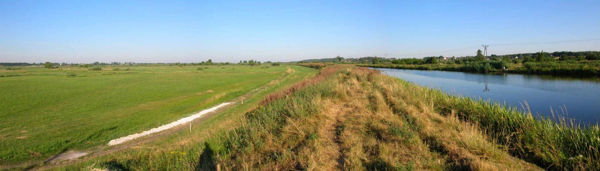 Dolina Środkowej Noteci i Kanału Bydgoskiego